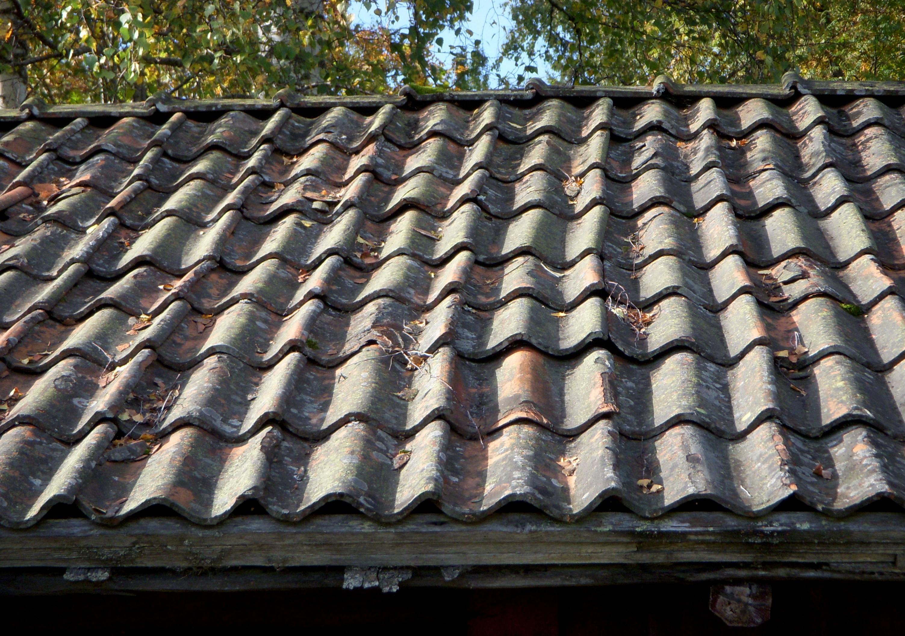 Tvåkupigt taktegel på en fäbod på Gasenberget, Dalarna